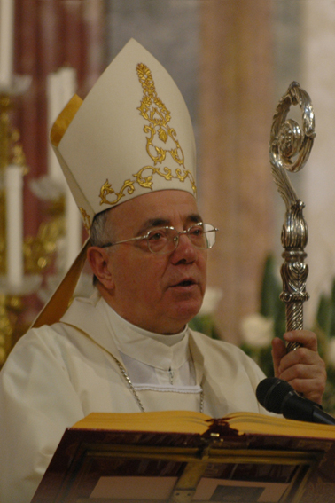 Monsignor Felice Cece Arcivescovo Emerito dell'Arcidiocesi di Sorrento-Castellammare di Stabia